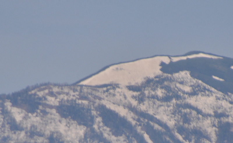 蝶ヶ岳（池田町中鵜）